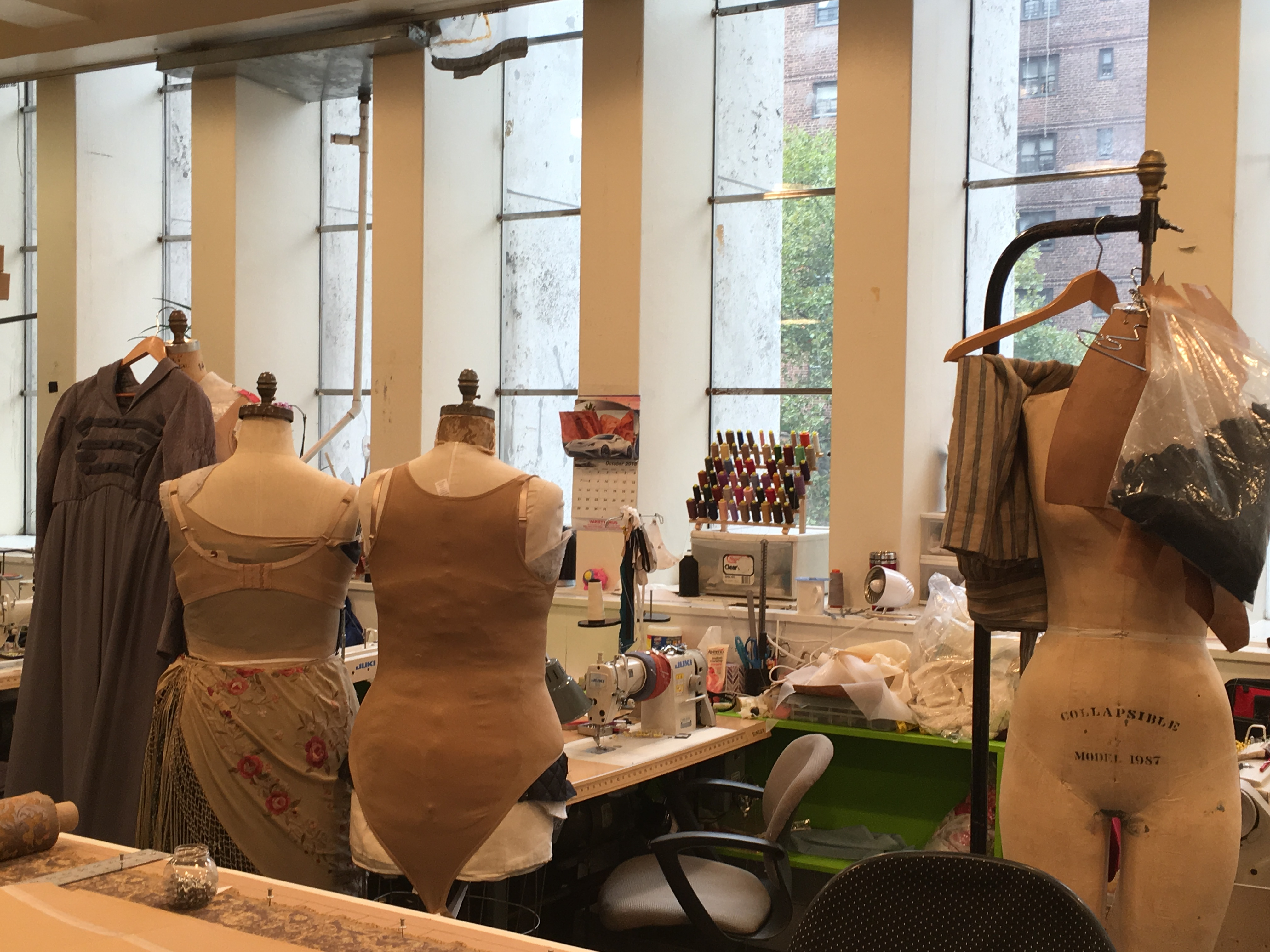 Site: Metropolitan Opera